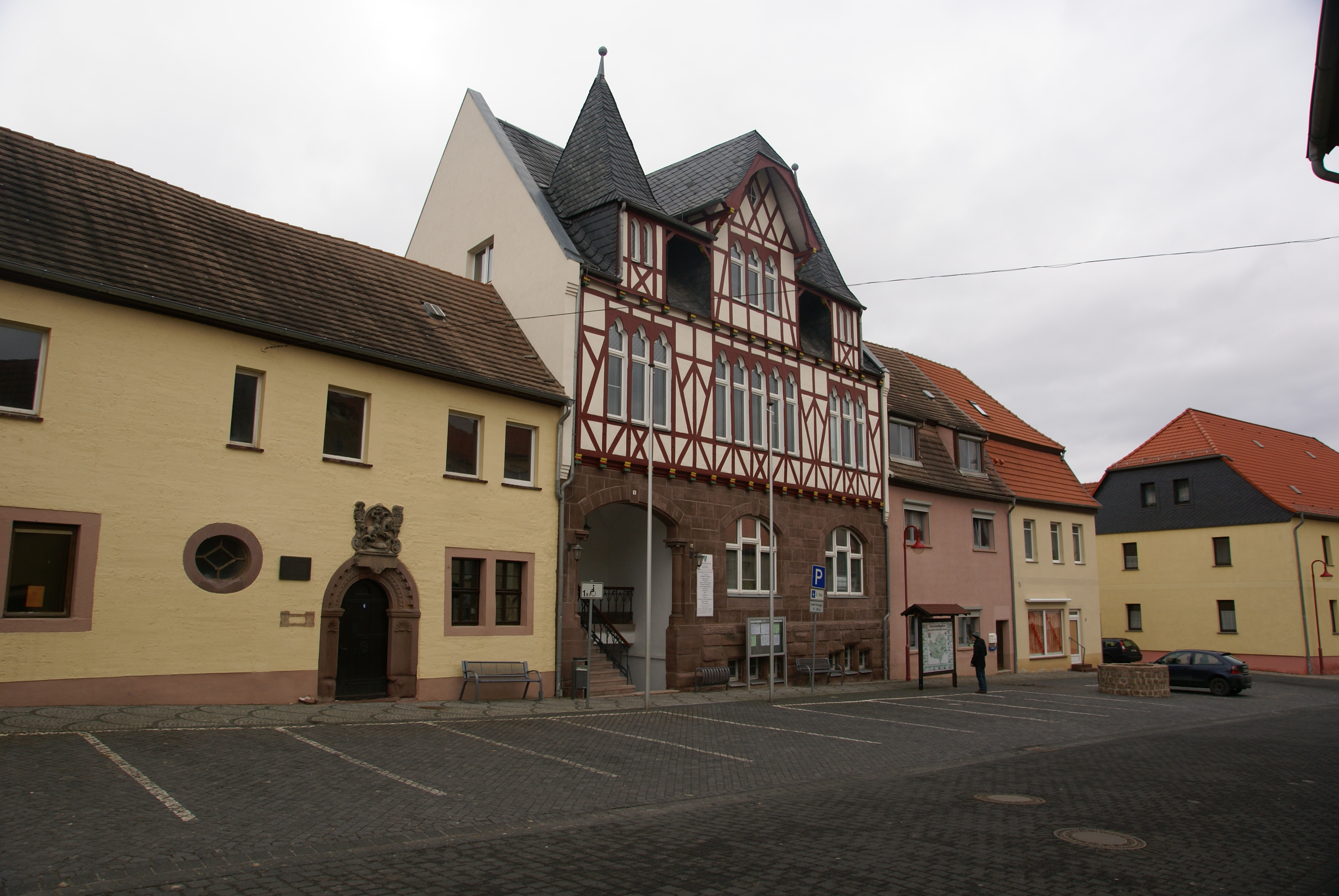 das Rathaus von Mansfeld